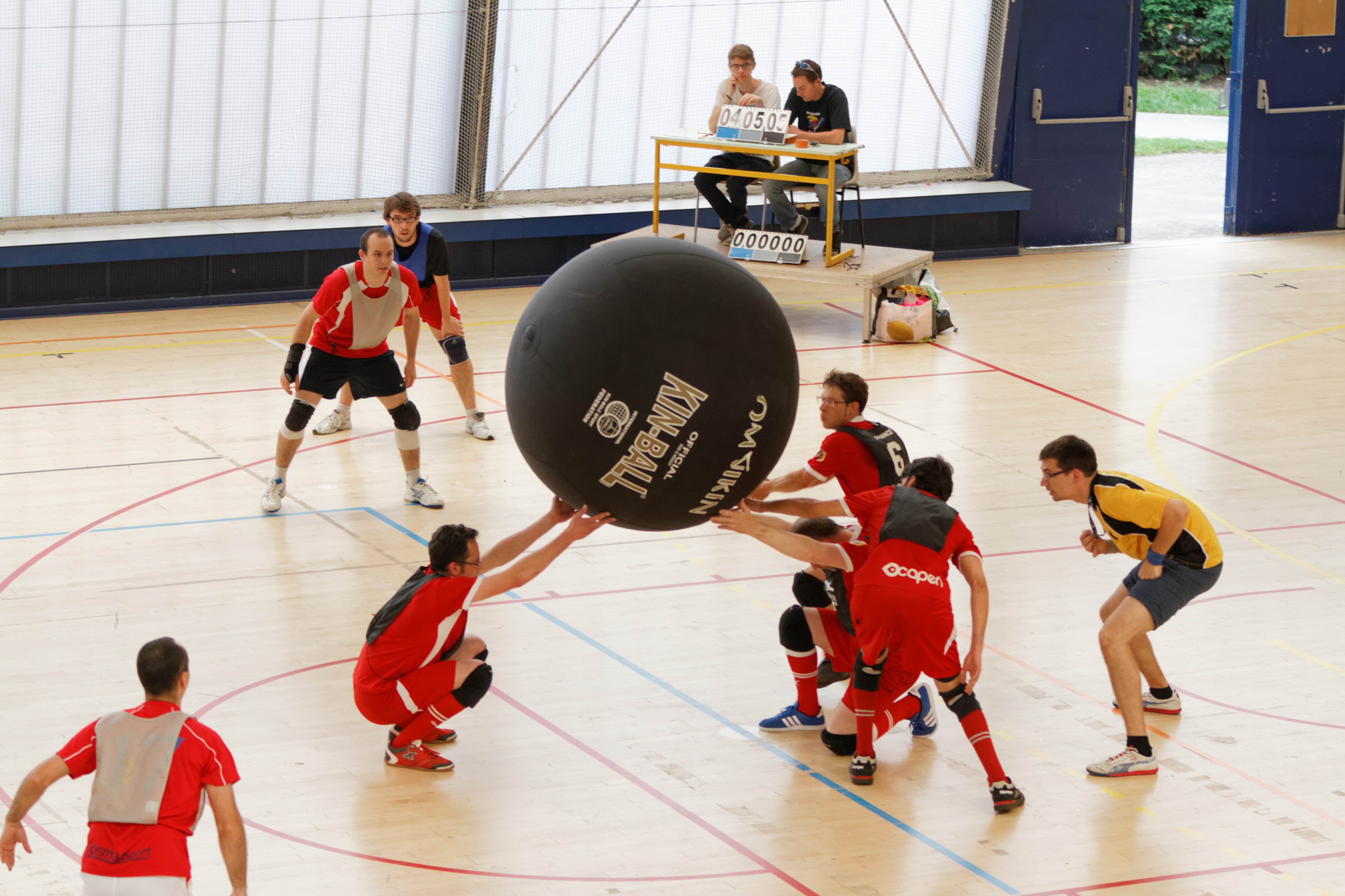 20e journée du championnat de France 2013-2014 de Kin-Ball, 8 juin 2014, Gymnase George Carpentier, Paris.